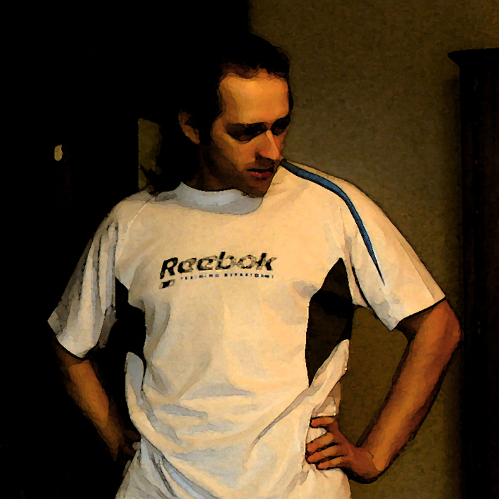 Michał Oracz